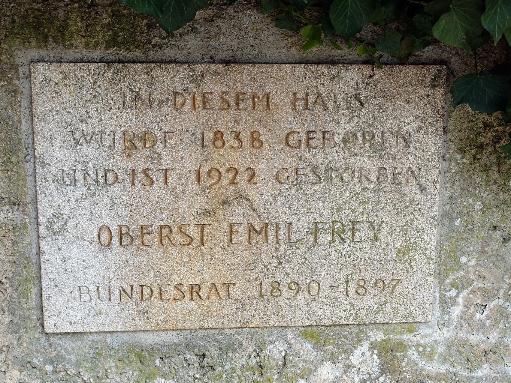 Emil Frey (1838–1922), Gedenkinschrift bei seinem Geburtshaus an der Domstrasse 3 in Arlesheim, Basellandschaft, Schweiz. Oberst im U.S Sezessionskrieg der Nordstaaten. Schweizer Bundesrat von 1890–1897. Schweizer Gesandter in Washington, Direktor der Internationalen Telegraphen-Union.